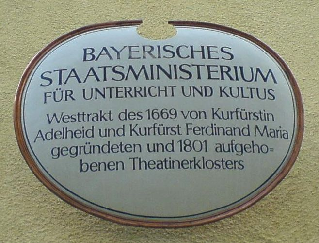 Munich